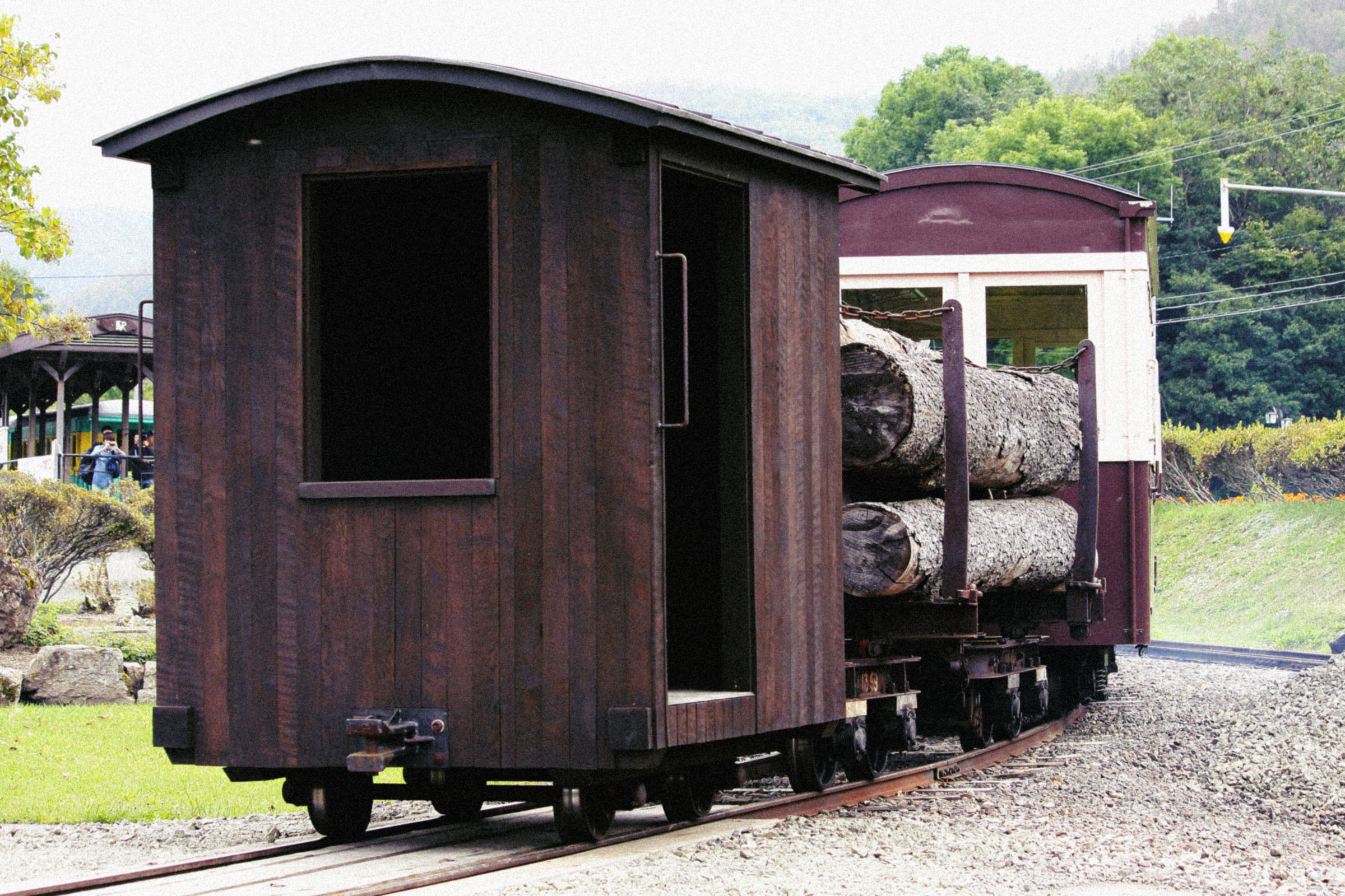 北海道遠軽町「丸瀬布森林公園いこいの森」で使用されている旧武利意森林鉄道緩急車の復元車と運材台車（2014年撮影）